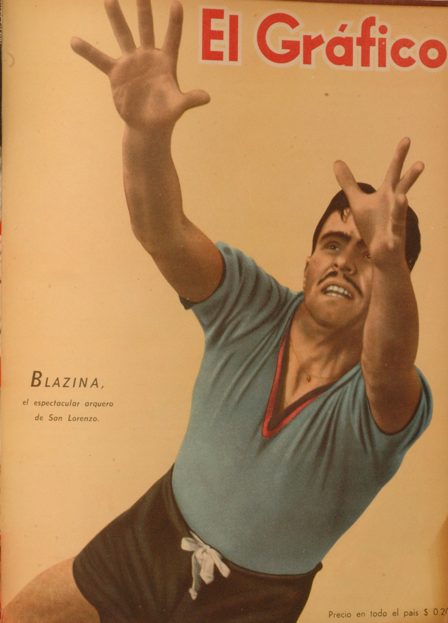 El Grafico del 28 de Julio de 1944. Edicion 1307